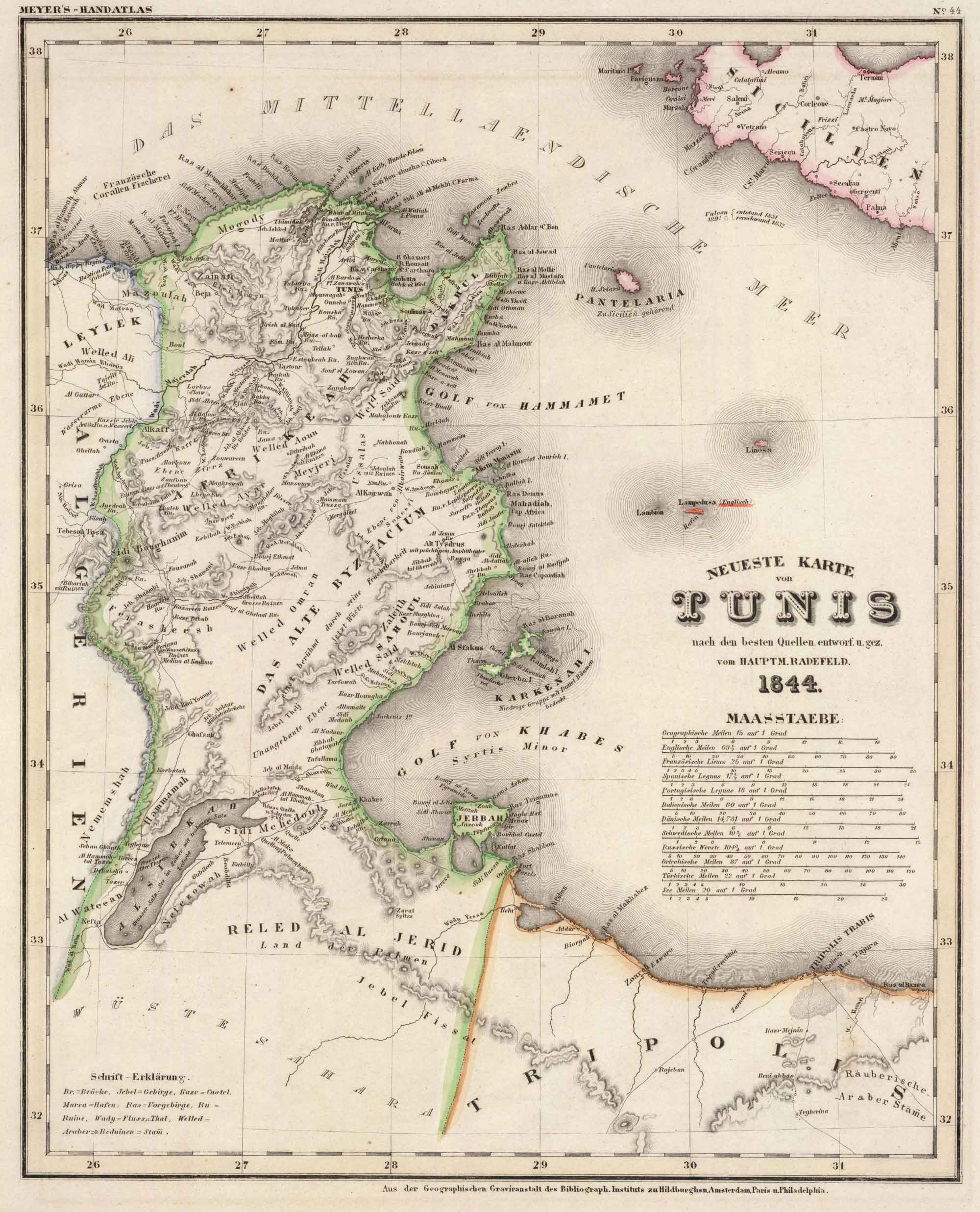 Carte allemande de la Tunisie en 1844